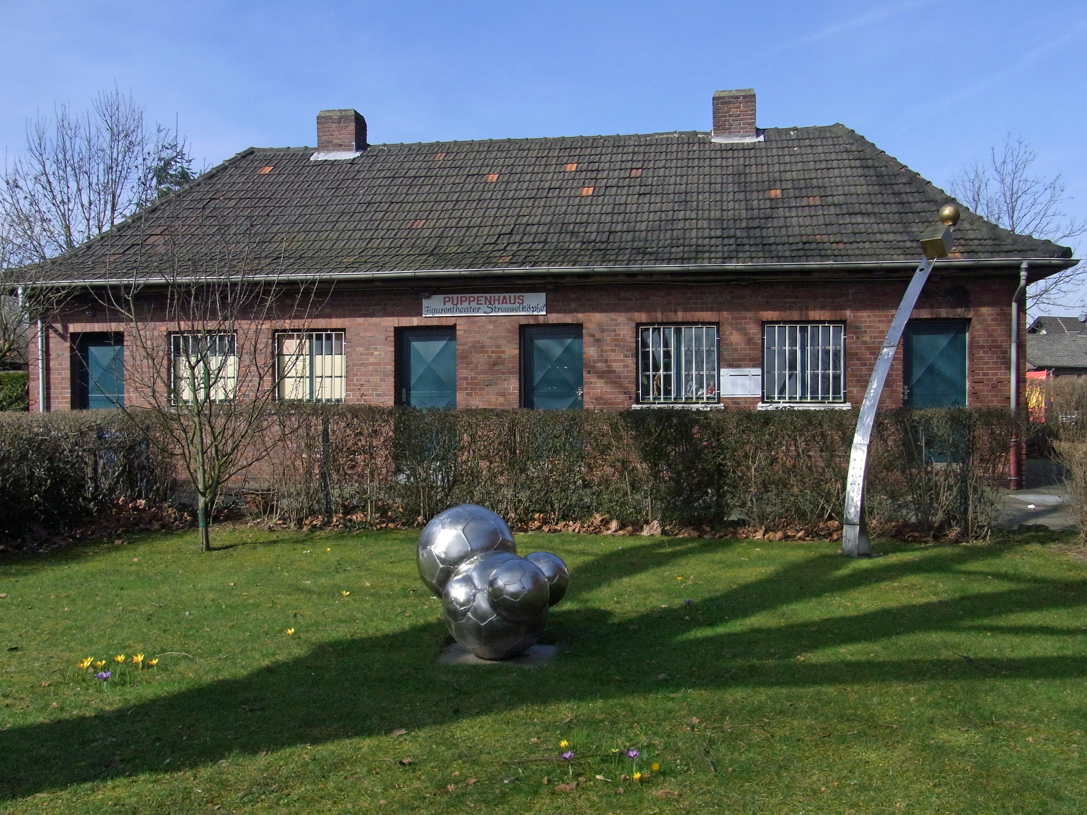 Siedlung Eisenheim